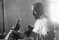 Il dottore Vincenzo Tiberio (1869 — 1915)